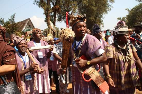 FOUMBAN temple de ma culture cameroun